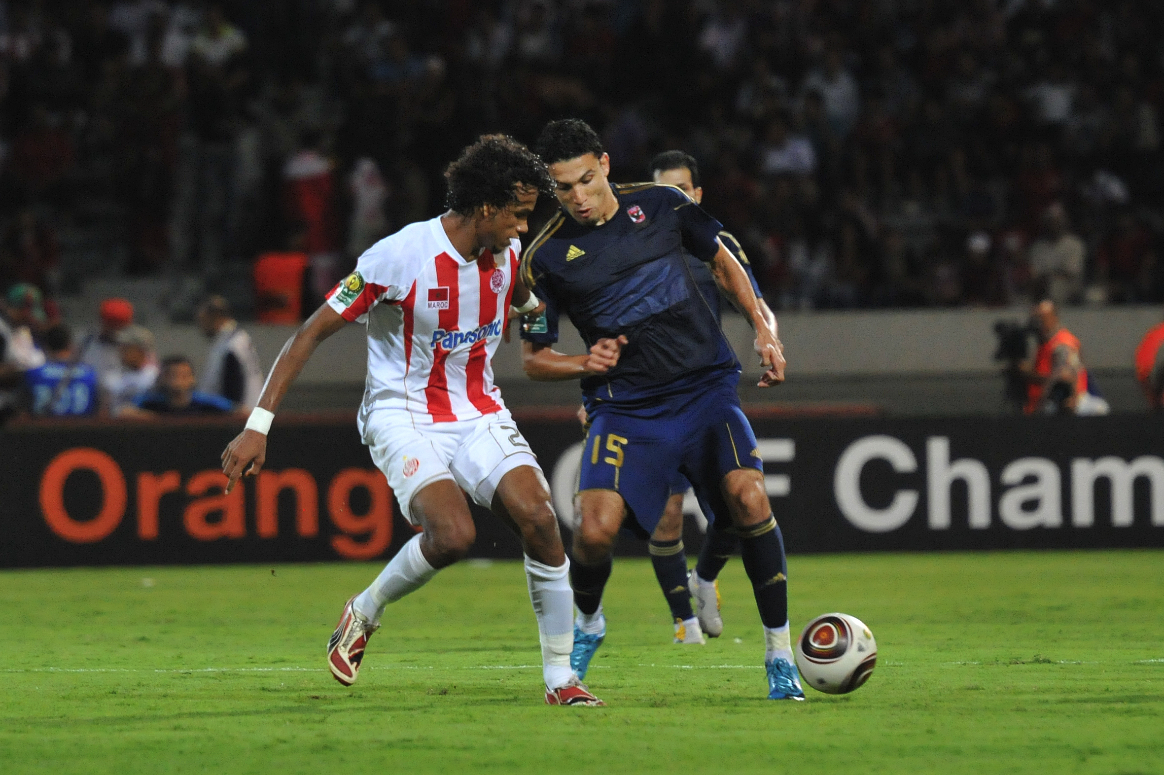 Match Wydad vs Al Ahly